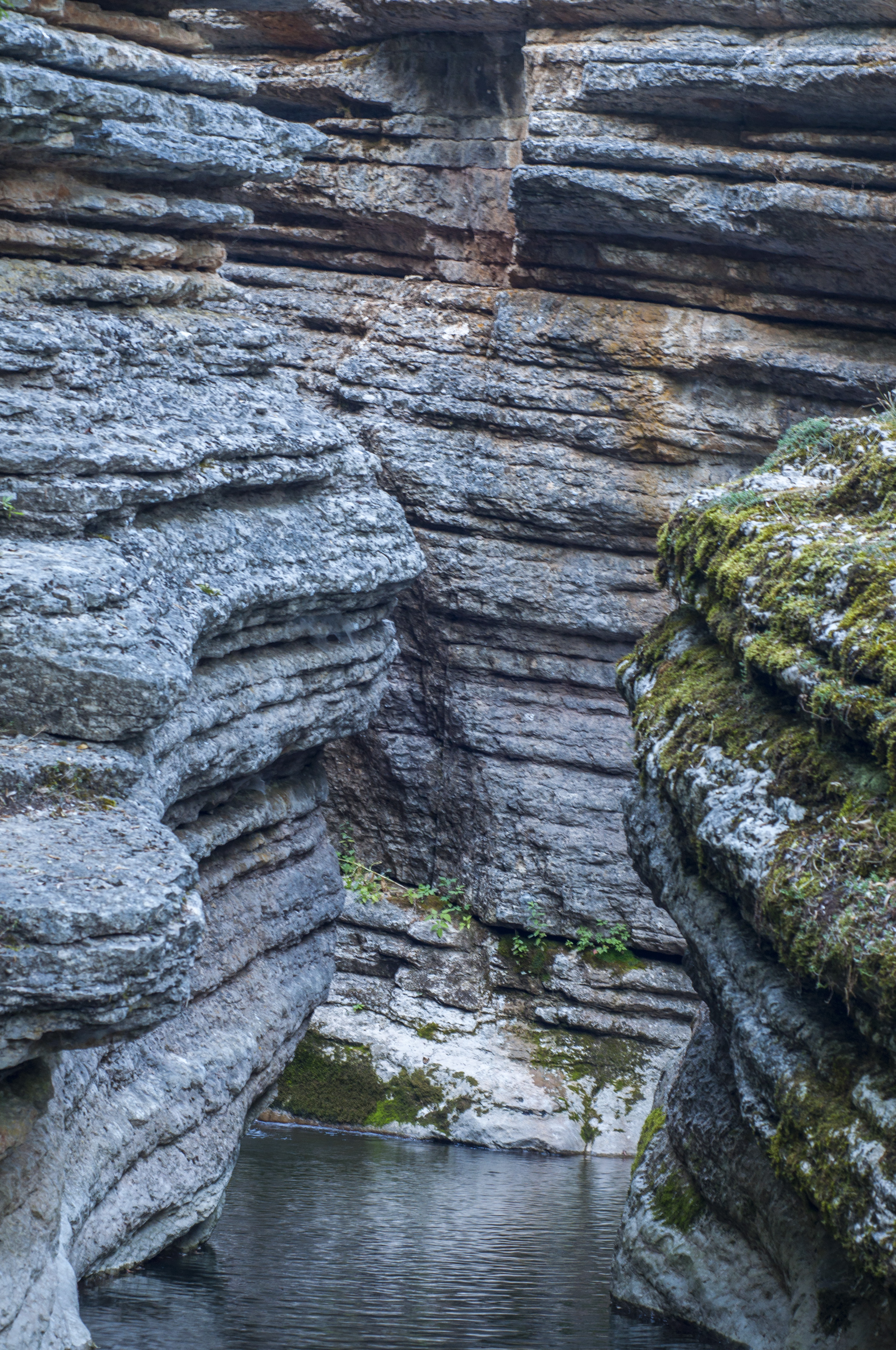 Росомачки лонци поглед на кањон